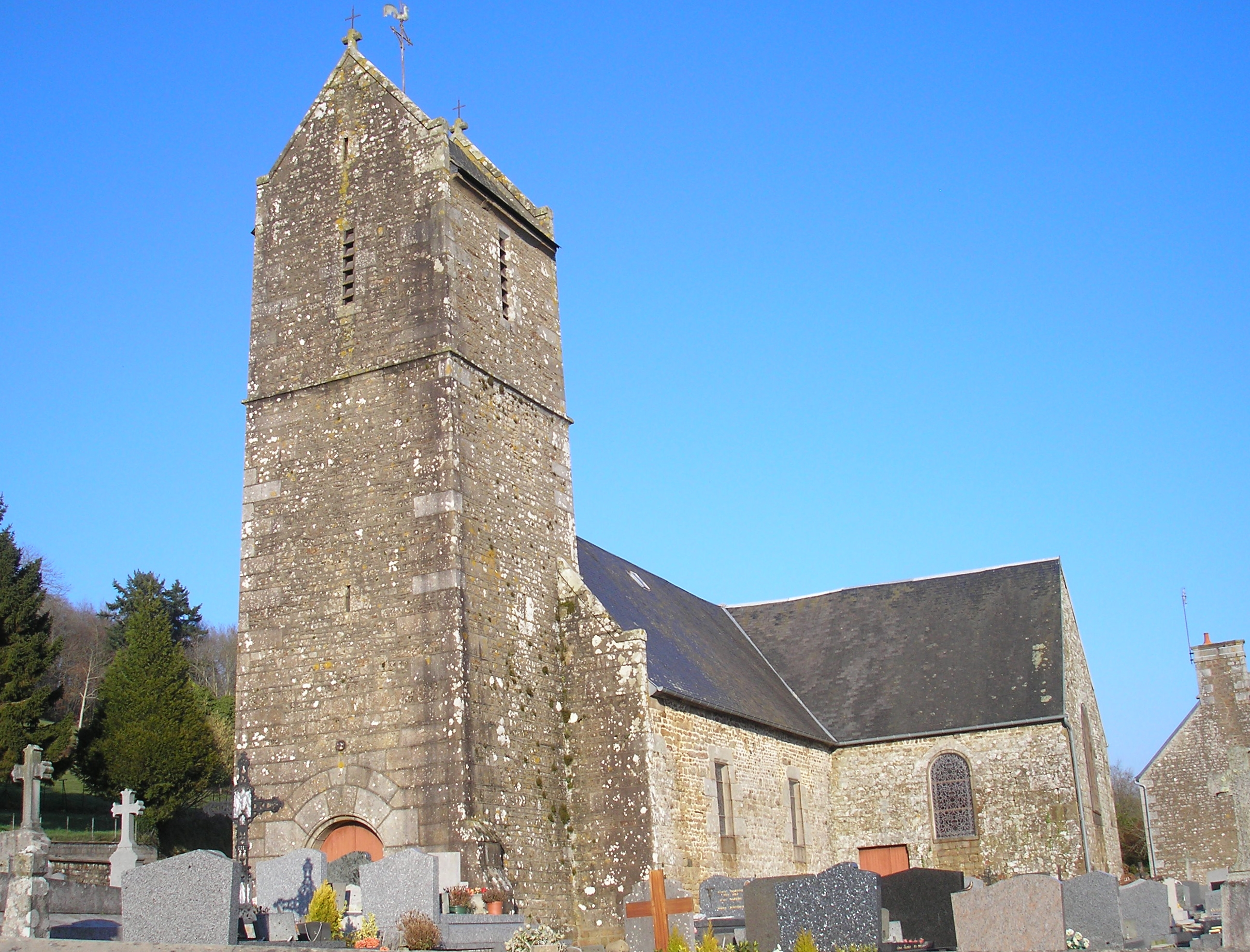 Le Mesnil-Rainfray (Normandie, France). L'église Saint-Martin.